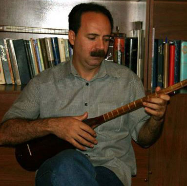 حیدر کاکیحیدر کاکی متولد1351.گوران. کرمانشاه .نوازنده تنبور تار سه تار... فارغ التحصیل کارشناسی موسیقی وکارشناسی ارشد آهنگسازی از دانشگاه سوره میباشد. نوازندگی تنبور را از کودکی شروع کرده واز محضر اساتید قدیمی تنبور بهره فراوان برده.ایشان شاگرد استاد علی اکبرمرادی هستند ودربیشتر البومهای وکنسرتهای استاد حضور داشته اند. هم اکنون در اموزشگاه تنبور یارسان با مدیریت استاد مرادی مشغول تدریس تنبورهستند.حیدر کاکی در دوران تحصیل از محضر بزرگترین موسیقی دانان ایران همچون استادان مصطفی کمال پورتراب وتقی ضرابی و علی اکبرشکارچی وساسان فاطمی و داریوش پیر نیاکان ومرحوم عطا...جنگوک محسن حجاریان و محس الهامیان و وارطان ساهاکیان کیاوش صاحب نسق و..........بهره مند شده است. از ایشان مقالاتی در فصل نامه موسیقی ماهور ومجله هنر وموسیقی و کتابهایی تحت عنوان ((زمینه شناخت تنبور))از انتشارات نوید شیرازو ته رزهای باستانی تنبور از موسسه موسیقی عارف چاپ شده و آلبومهایی بانام ته رز تنبوراز نشر آوای باربد،نوایی دیگر ((همنوایی تنبور و پیانو)) وسحرگاهان با صدای بیژن کامکار ونوای تنبور از موسسه ماهور در بازارموجود است